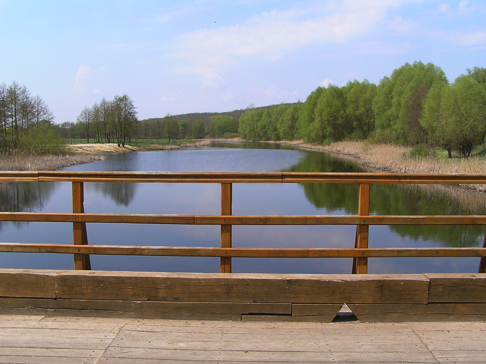 Гідрологічний заказник «Пустовійтівський», Пустовійтівська с/р, Роменський р-н., Сумська обл.